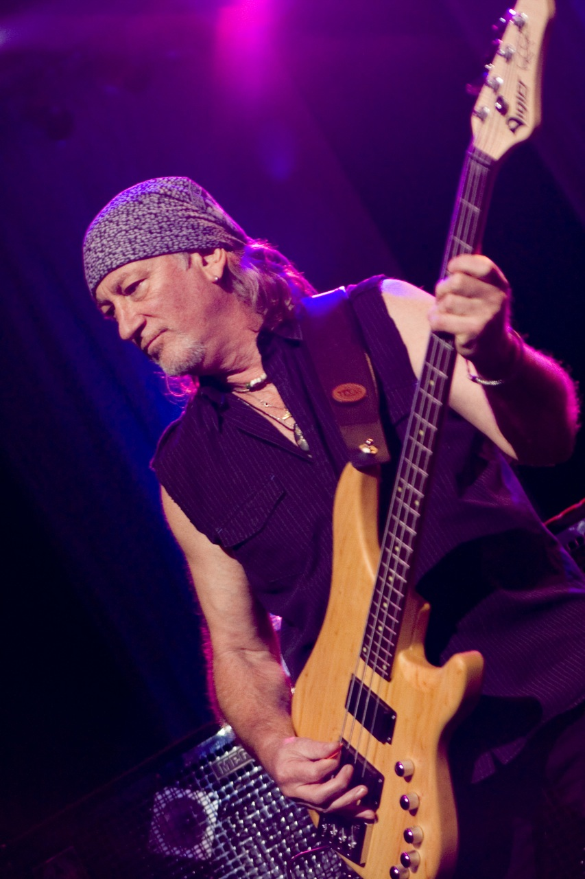 Deep Purple Live @ Via Funchal - 07/03/2009 - São Paulo, Brasil Fotógrafo: Alexandre Cardoso